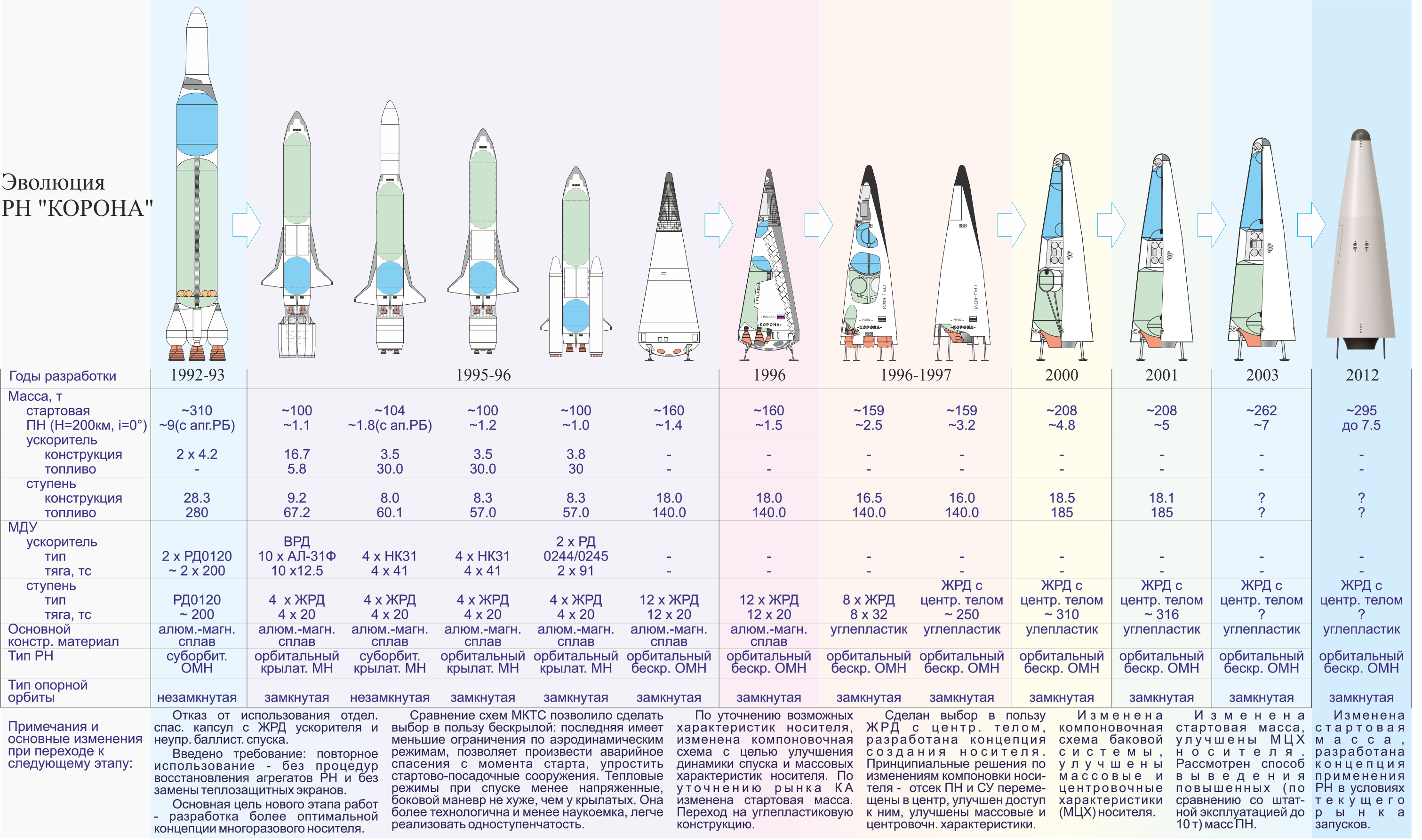 Этапы разработки одноступенчатой многоразовой РН КОРОНА с 1992 по 2012 годы